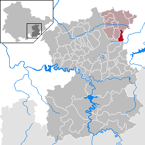 Tömmelsdorf in Thuringia - Saale-Orla-Kreis